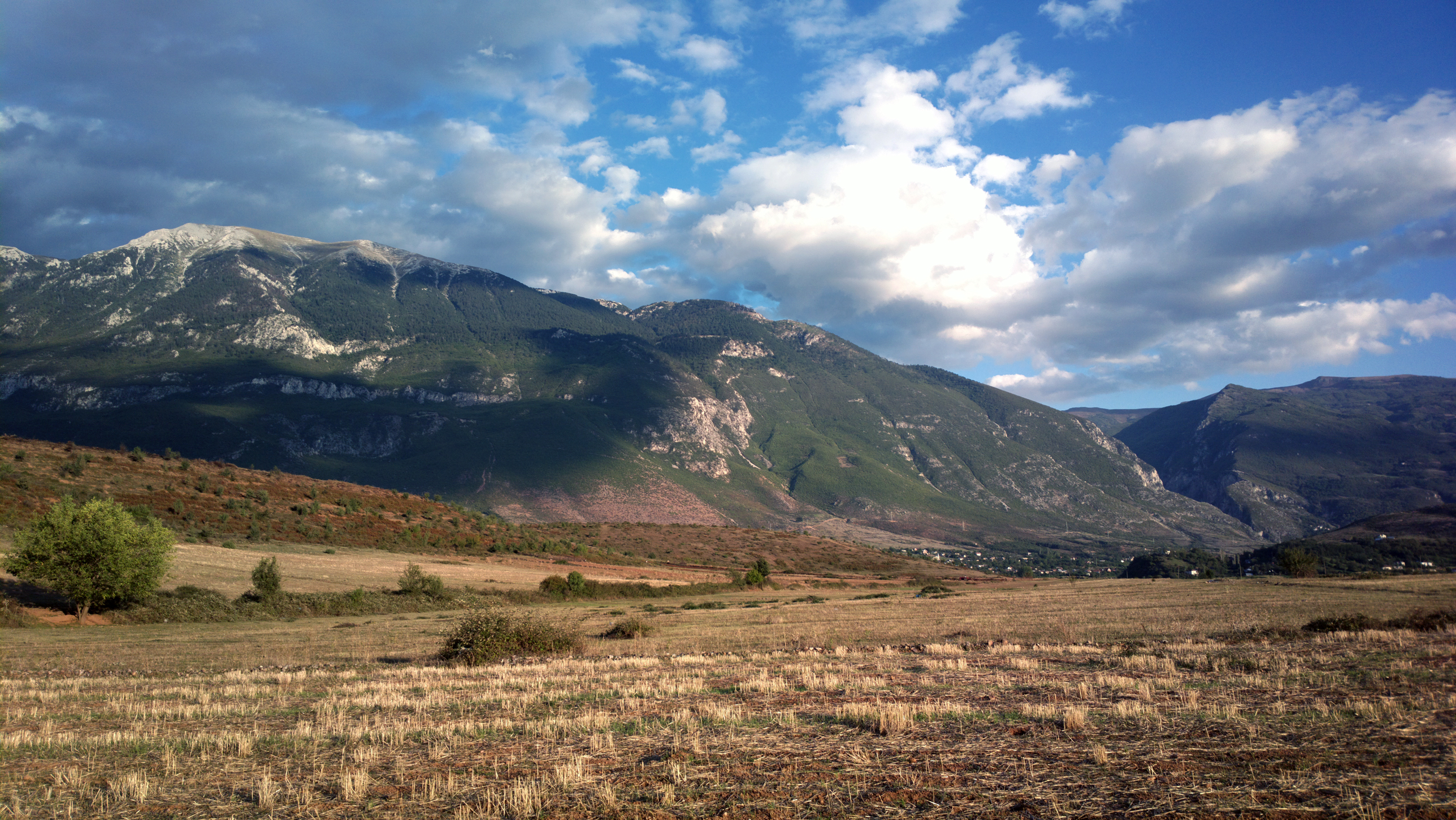 Mali Gjallica fotografuar nga fshati Nange